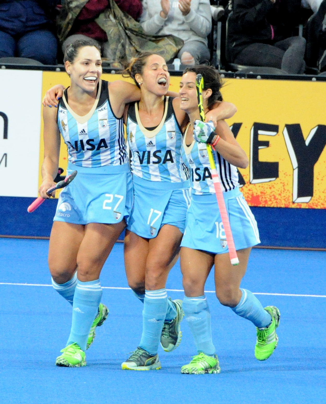 Argentina 2016 CT Champions - Noel Barrionuevo, Rocio Sanchez and Pilar ROmang